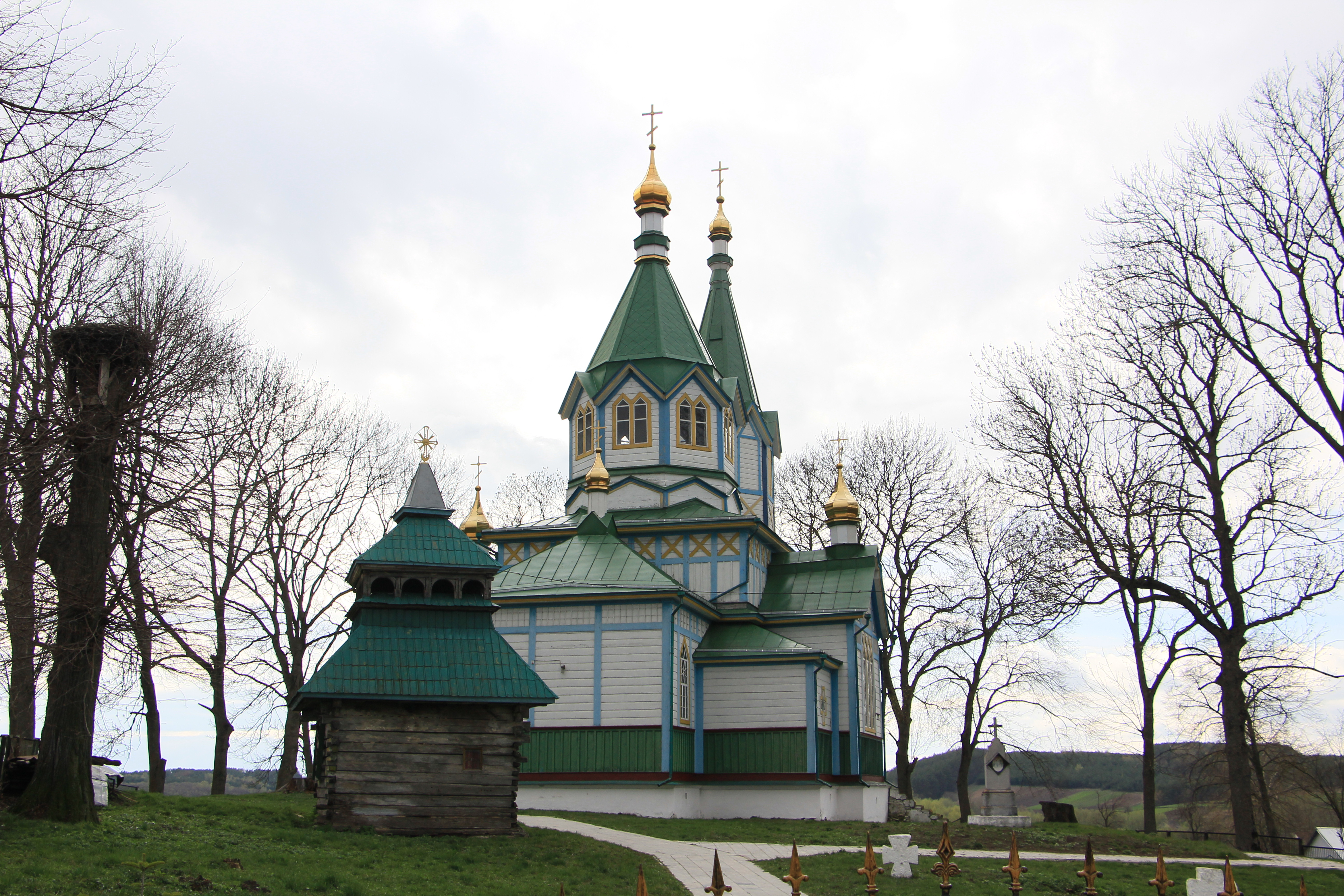 Дерев'яна церква села Кордишів Шумського району, Тернопільської області